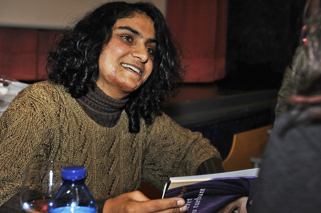 Nadia Ghulam 2012